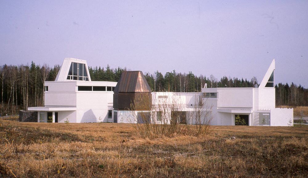 Kellonummen kappeli. Espoo, Finland